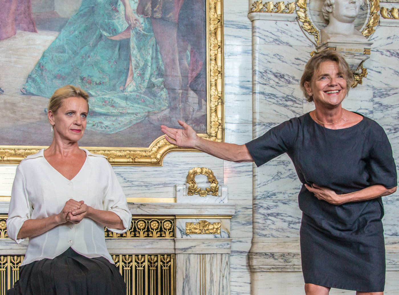 Ylva och Stina Ekblad under Dramatens höstsamling den 18 augusti 2015.